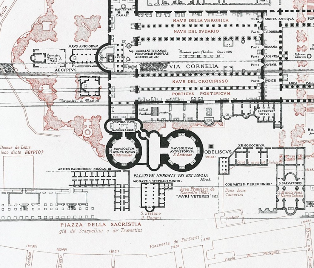 Pianta di Lanciani